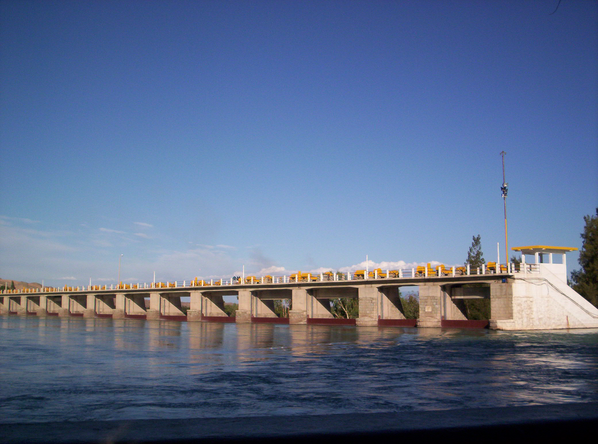 Fotografía del Dique José Ignacio de la Roza, departamento Rivadavia, provincia San Juan, Argentina